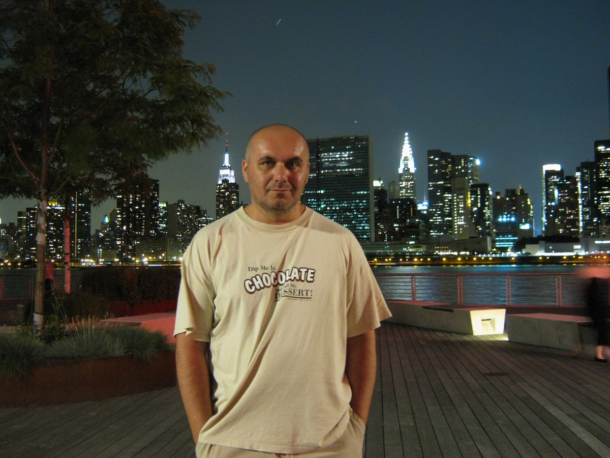 Dancs Artur